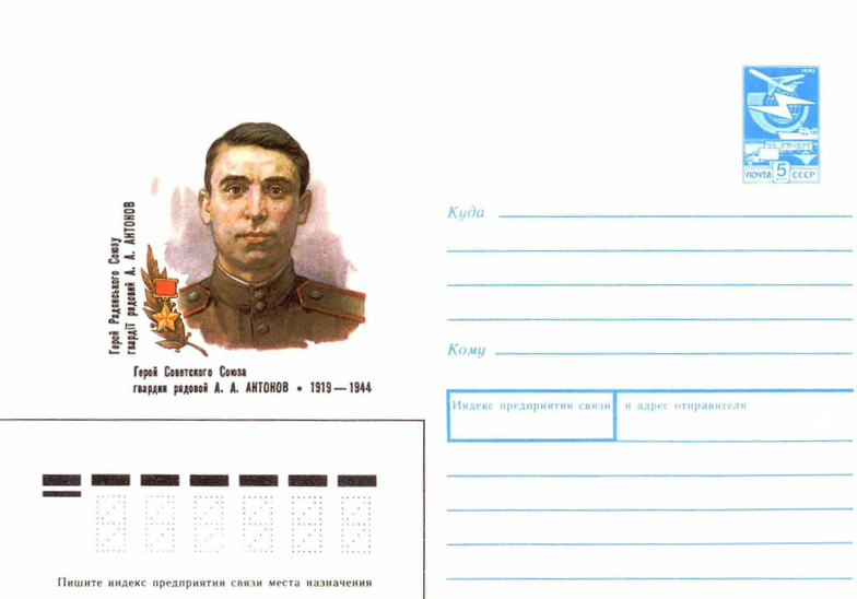 Конверт с маркой СССР. Герой Советского Союза Антонов Антон Антонович (портрет). 1919-1944.